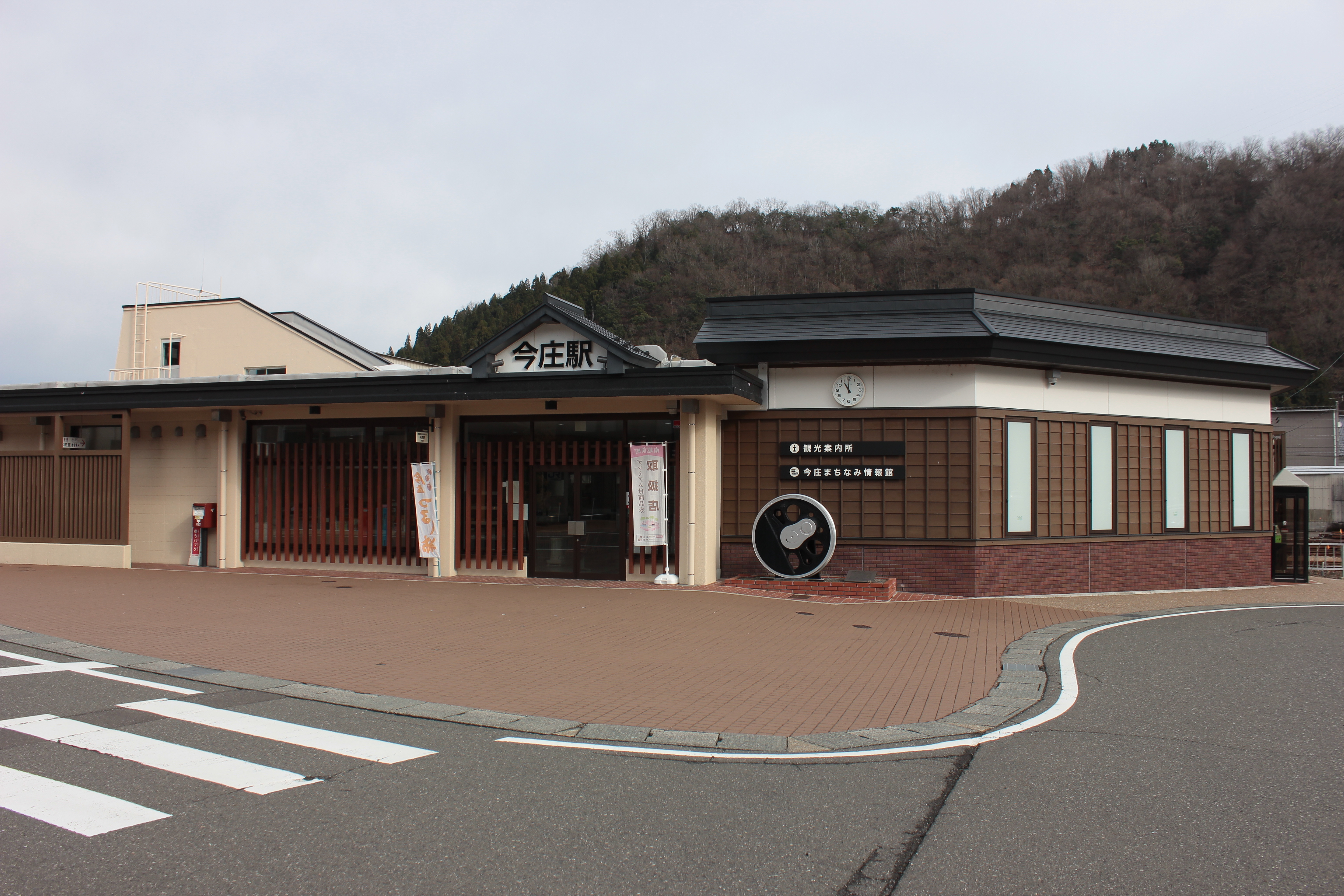 今庄駅（福井県南条郡南越前町）、2019年撮影。 Canon EOS Kiss X5